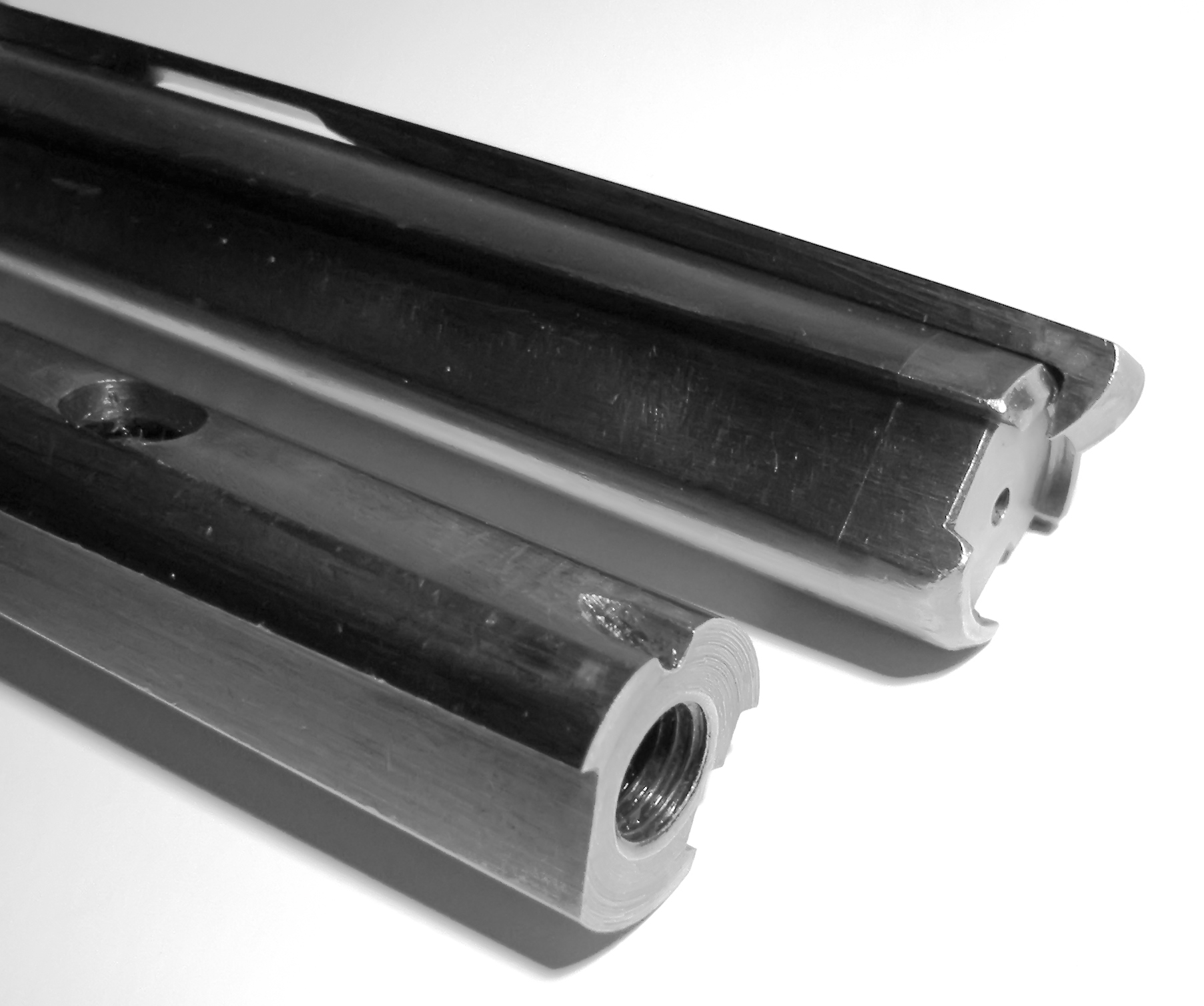 Culasse du système de 1911, détail du cylindre